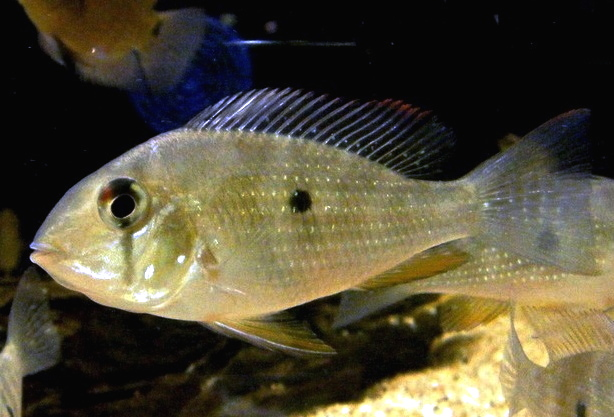 Acarichthys heckelii - subadulte